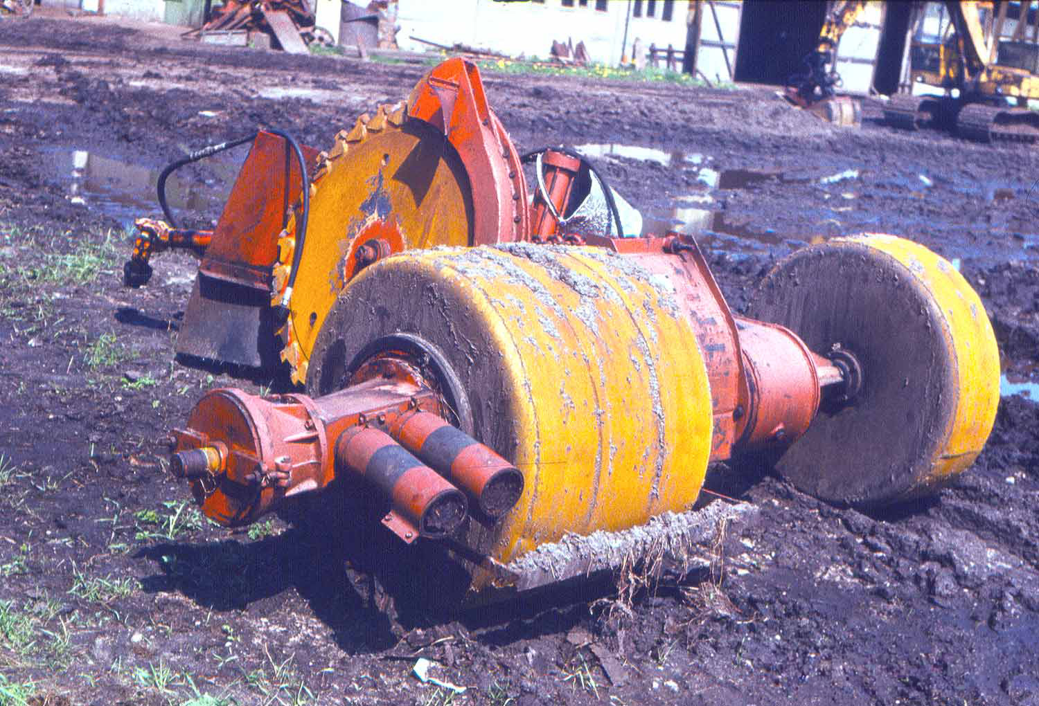 Torfgewinnung in West-Mecklenburg, Scheibenfräse